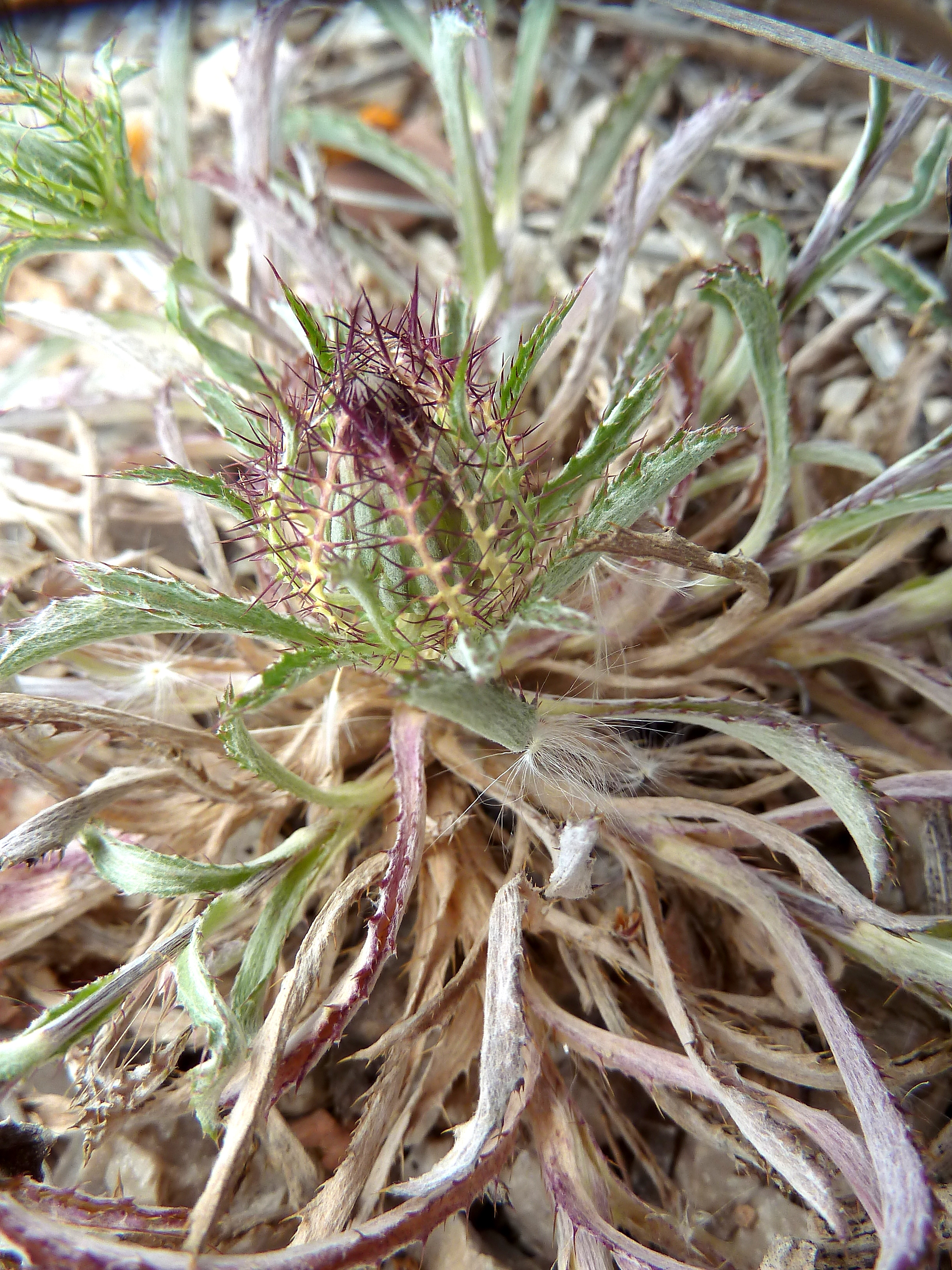 Atractylis cancellata (cancelillos, cardo enrejado,...) - Capítulo central sentado de la roseta basal de hojas. - circa Villa Suzana, Colonia Illicitana, Albatera (Provincia de Alicante, España).